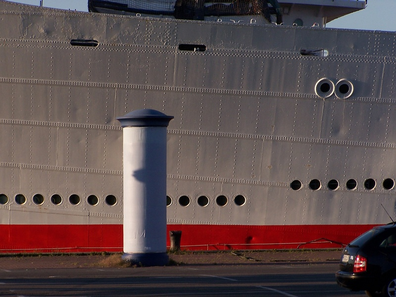 Schiffsrumpf der Georg Büchner im Rostocker Stadthafen